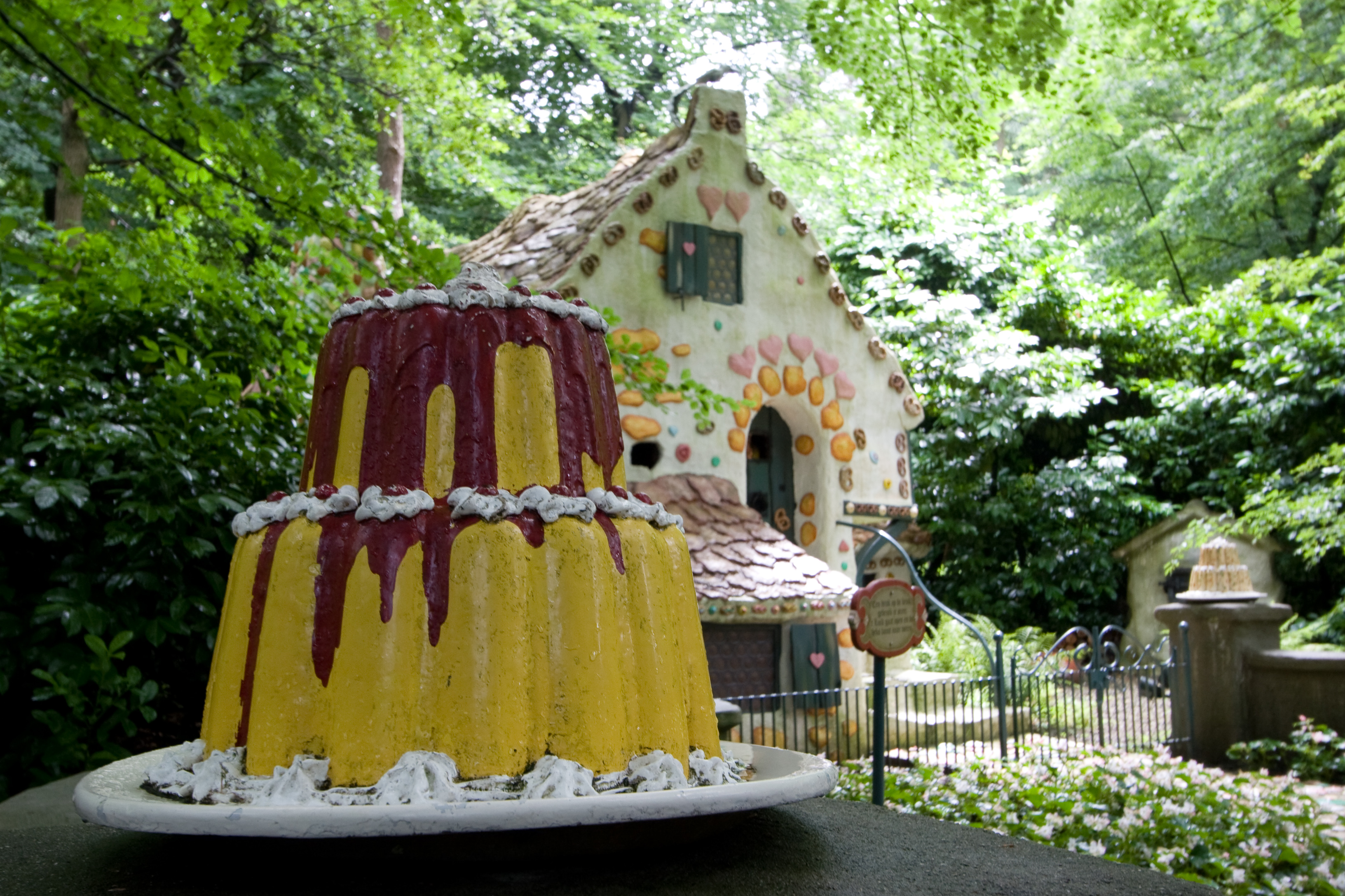 Hans en Grietje - Efteling